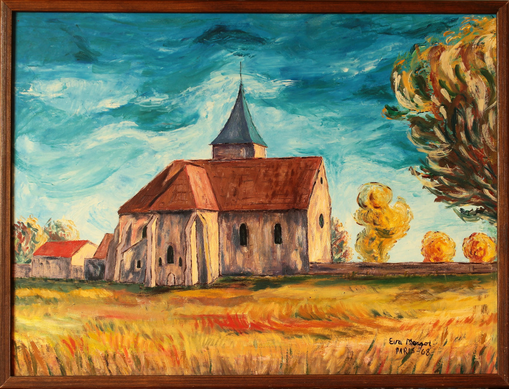 Peinture de l'Eglise Notre-Dame de l’Assomption d’Esmans - France - Seine et Marne par la peintre norvégienne Eva Margot en 1968